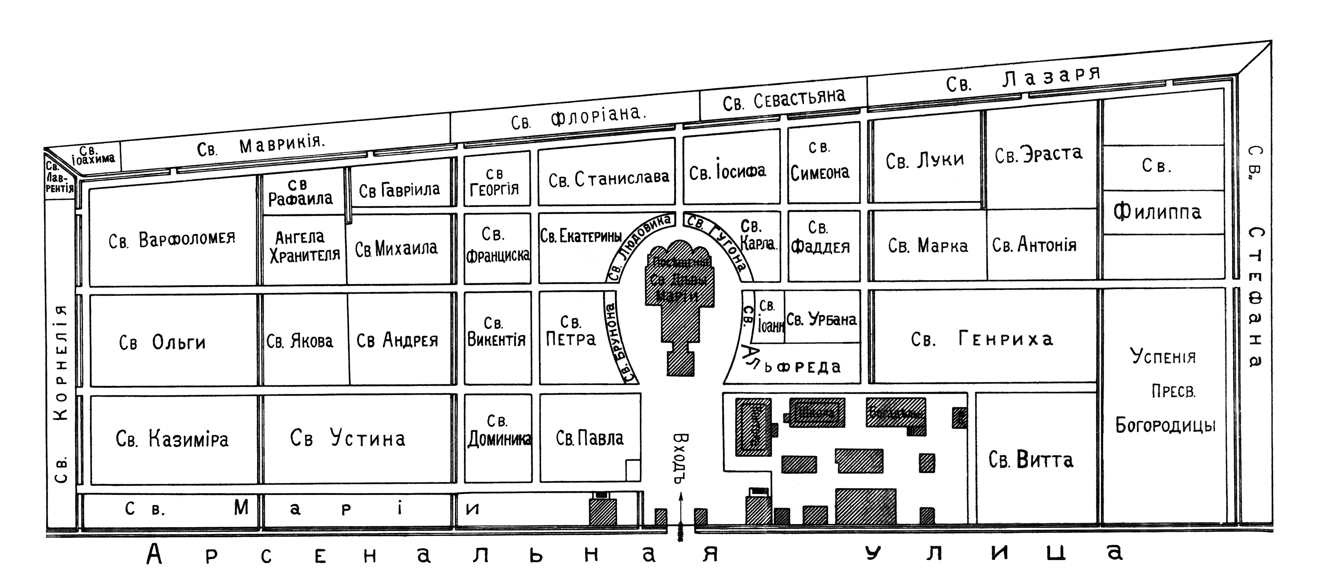 План Выборгского римско-католического кладбища, 1913 год.